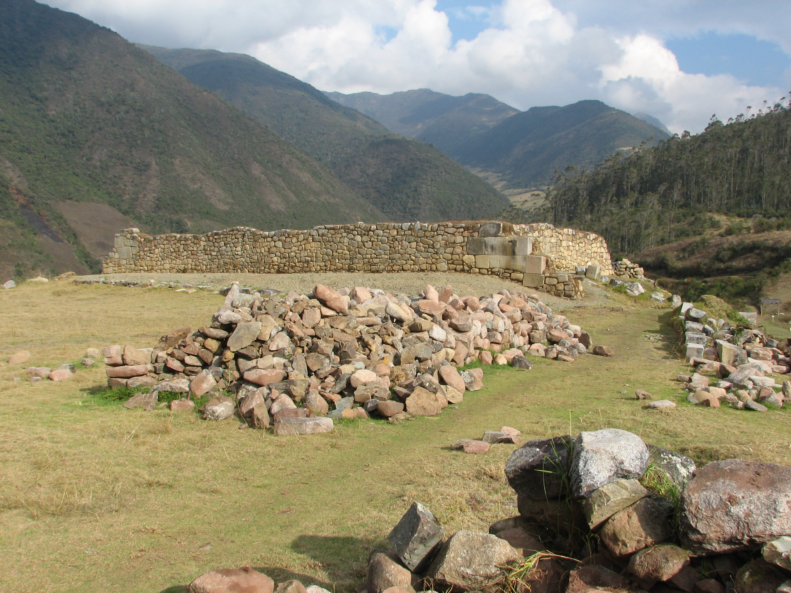 Vitcos Archaeological site